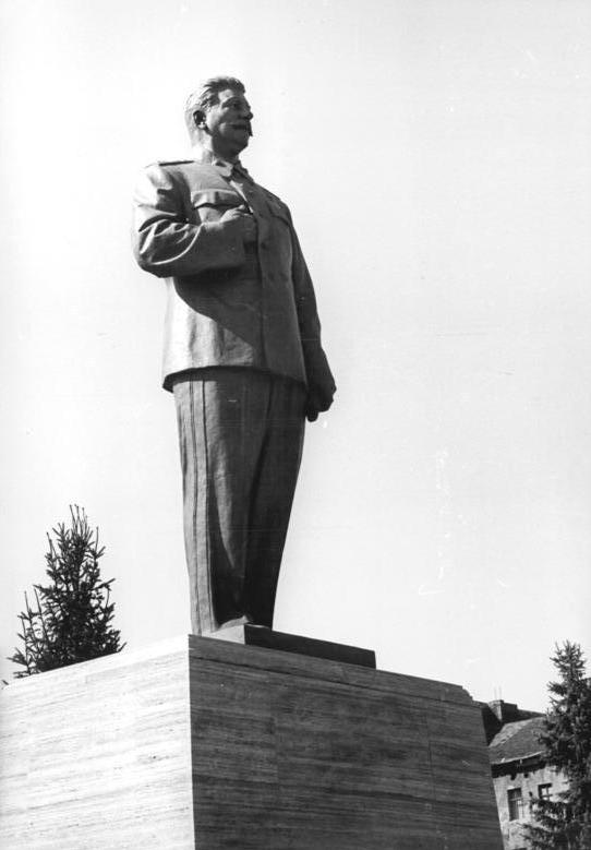 ADN-ZB-Schmidtke-29.8.1951 Berlin: Das Denkmal J.W.Stalins in der Stalinallee (heute Karl-Marx-Allee).